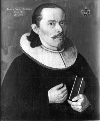 Johann Adam Osiander (1622-1697) d.Ä., Gemälde in der Professorengalerie Tübingen. Öl auf Holz; Maße 48,8 × 59,2 cm.